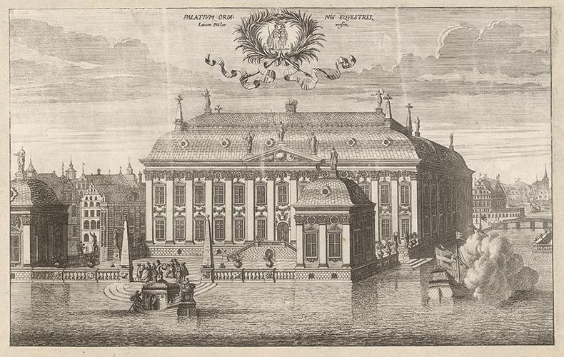 Palatium Ordinis Equestris Lacum Mäler versus : [Bild] / [Jean Le Pautre]